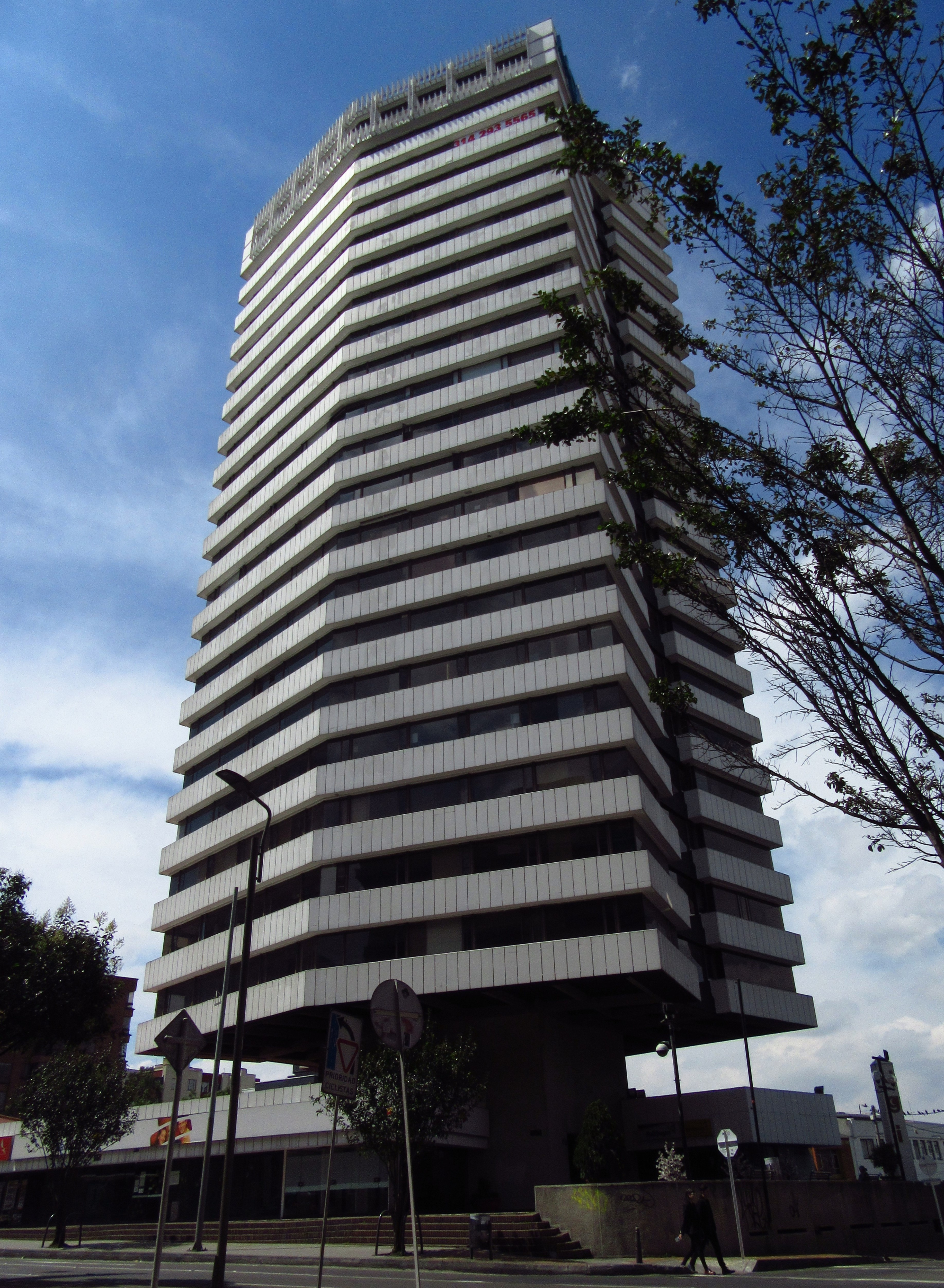 El Edificio UGI (edificio de la Unión General de Inversiones) es una estructura de 22 pisos situada en Bogotá diseñada por el arquitecto Hernando Vargas Rubiano. Fue terminado en 1974. Allí se encuentran las oficinas de diversas compañías. El modo como se construyó la torre, denominado 'núcleo central deslizado', resultó ser innovador en la época y fue la primera vez que se utilizó en América del Sur. El núcleo de la torre se construyó primero y cuando se terminó se construyeron los pisos de arriba hacia abajo, se colgaron los pisos por medio de cables y se sujetaron al núcleo donde se ubican los ascensores, baños y las escaleras.